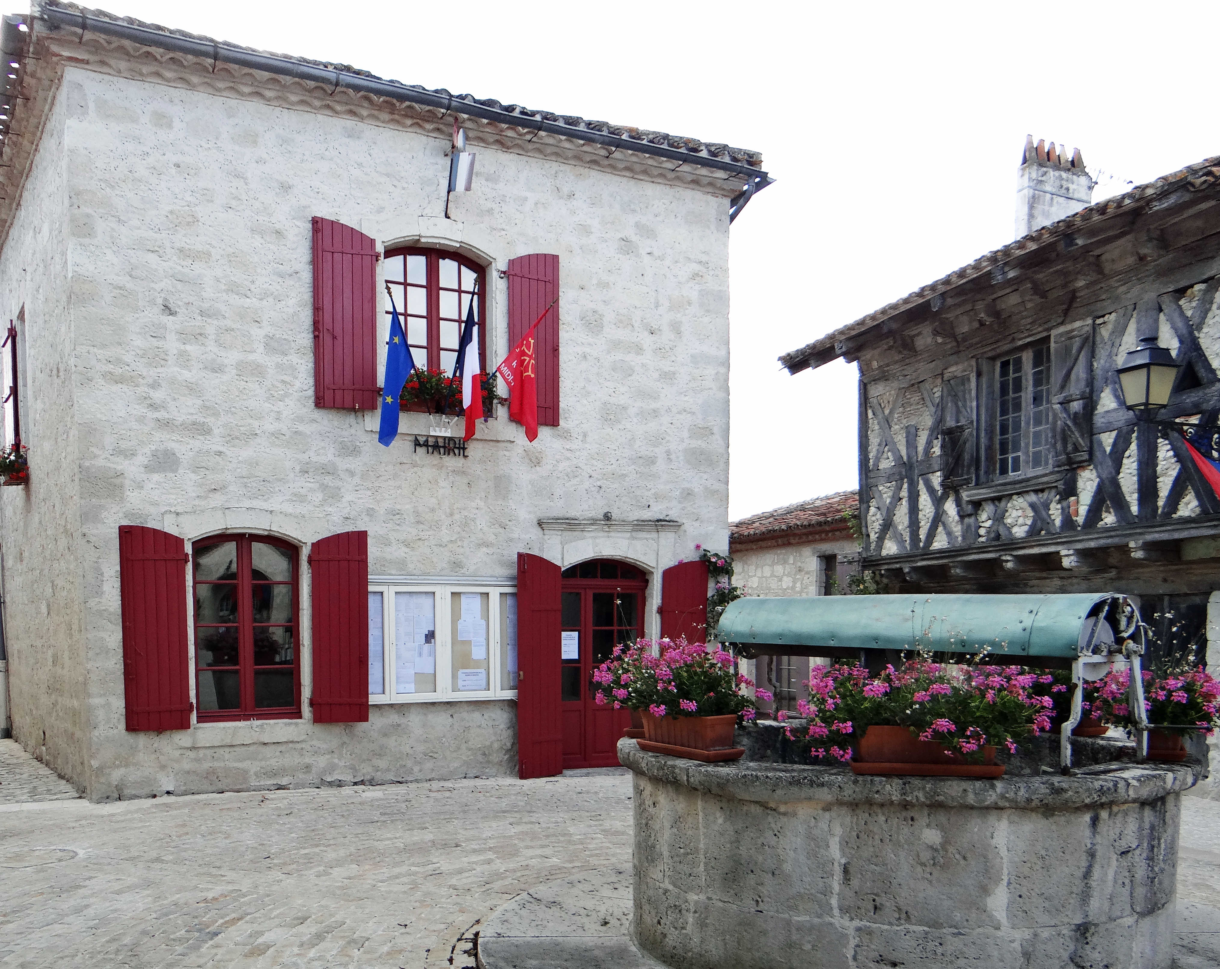 Montjoi - Mairie